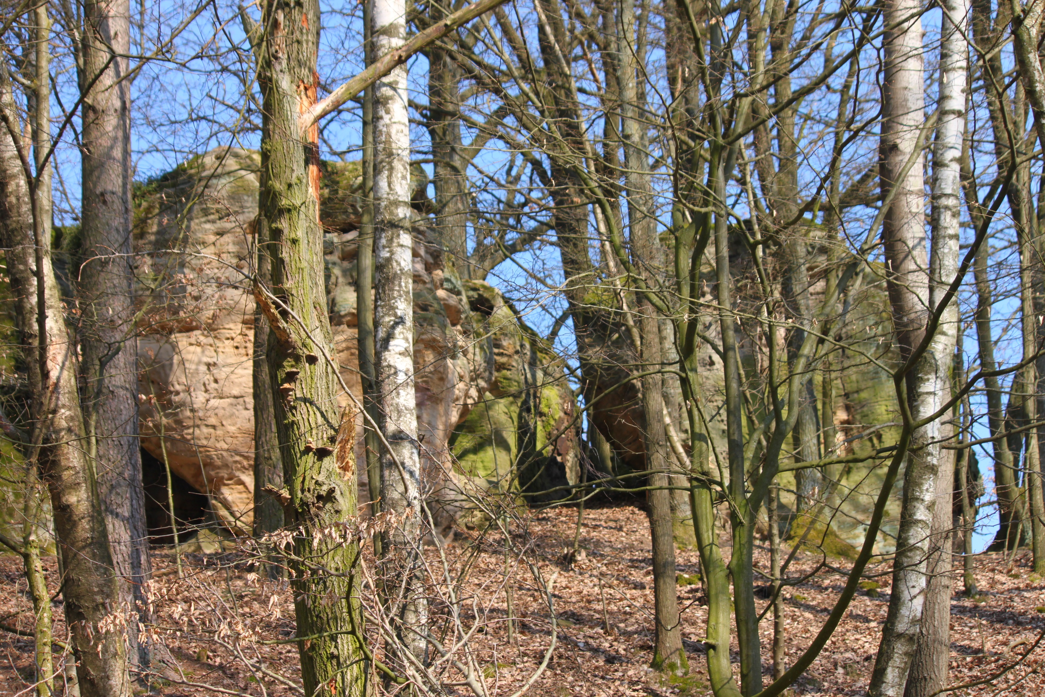 Teufelsfelsen westlich von Veitlahm, Felswand/-hang, Tafoni/Wabenverwitterung